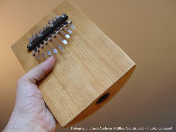 Kalimba Musikinstrument, GNU-FDL Das Bild ist selbstfotographiert und darf im Sinne der GNU-FDL verwendet werden.